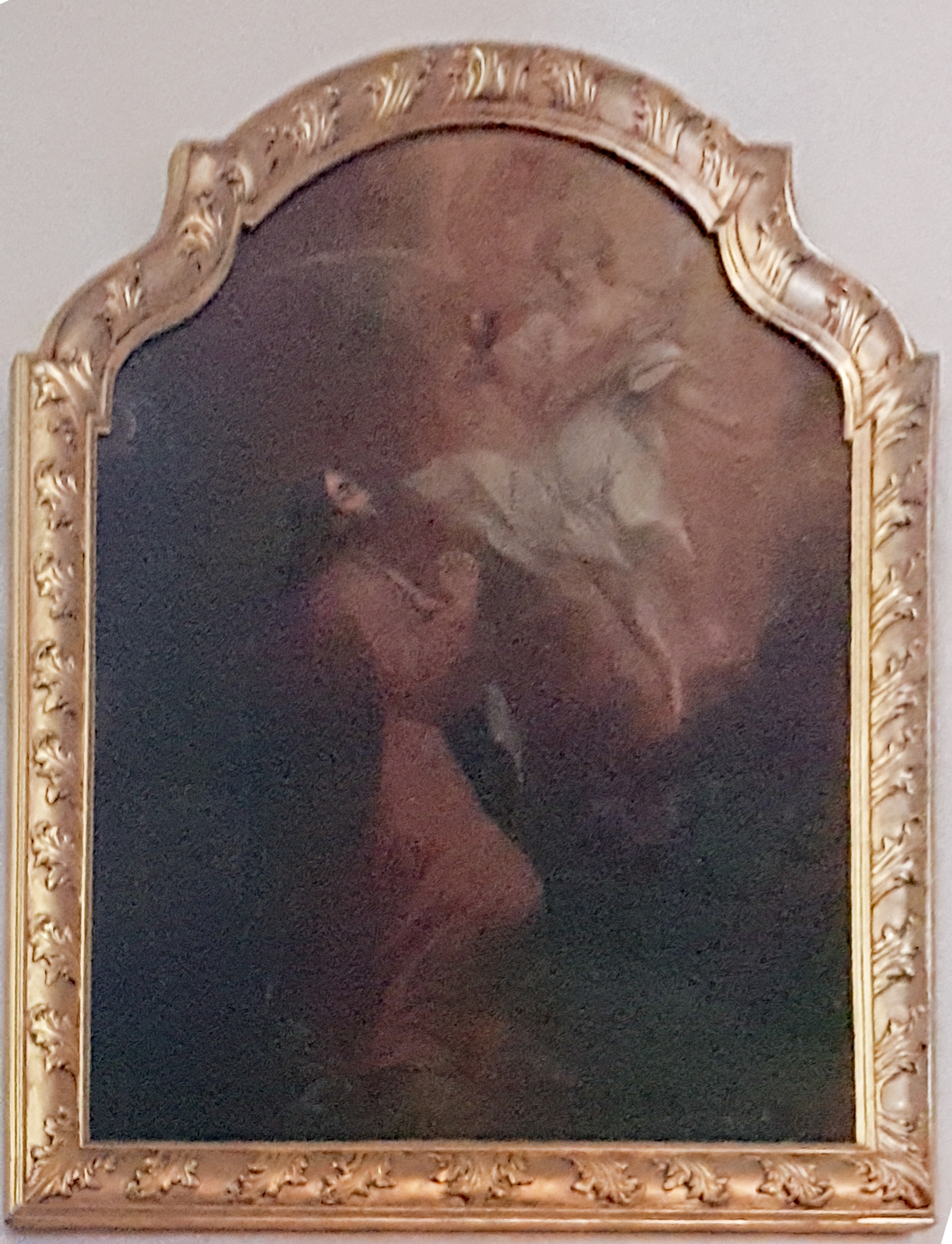 Obraz Modlitwa w Ogrójcu z 1715 autorstwa barokowego malarza wrocławskiego Johanna Jacoba Eybelwiesera